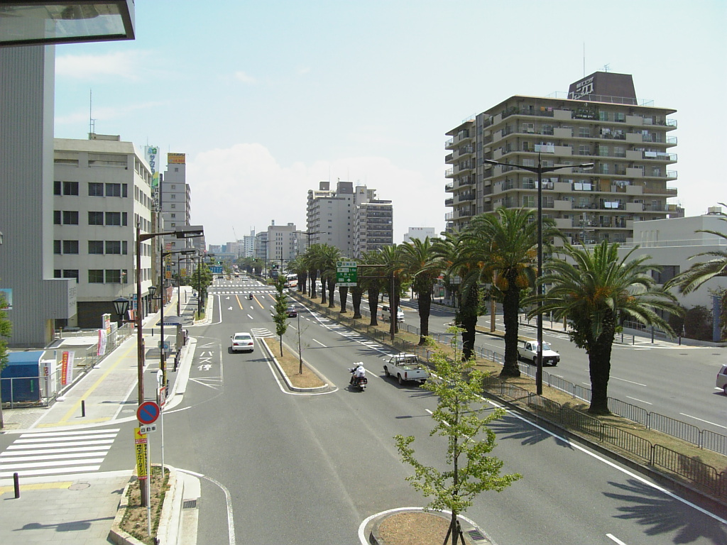 フェニックス通り (大阪府堺市)南海堺駅 東側の歩道橋上から撮影